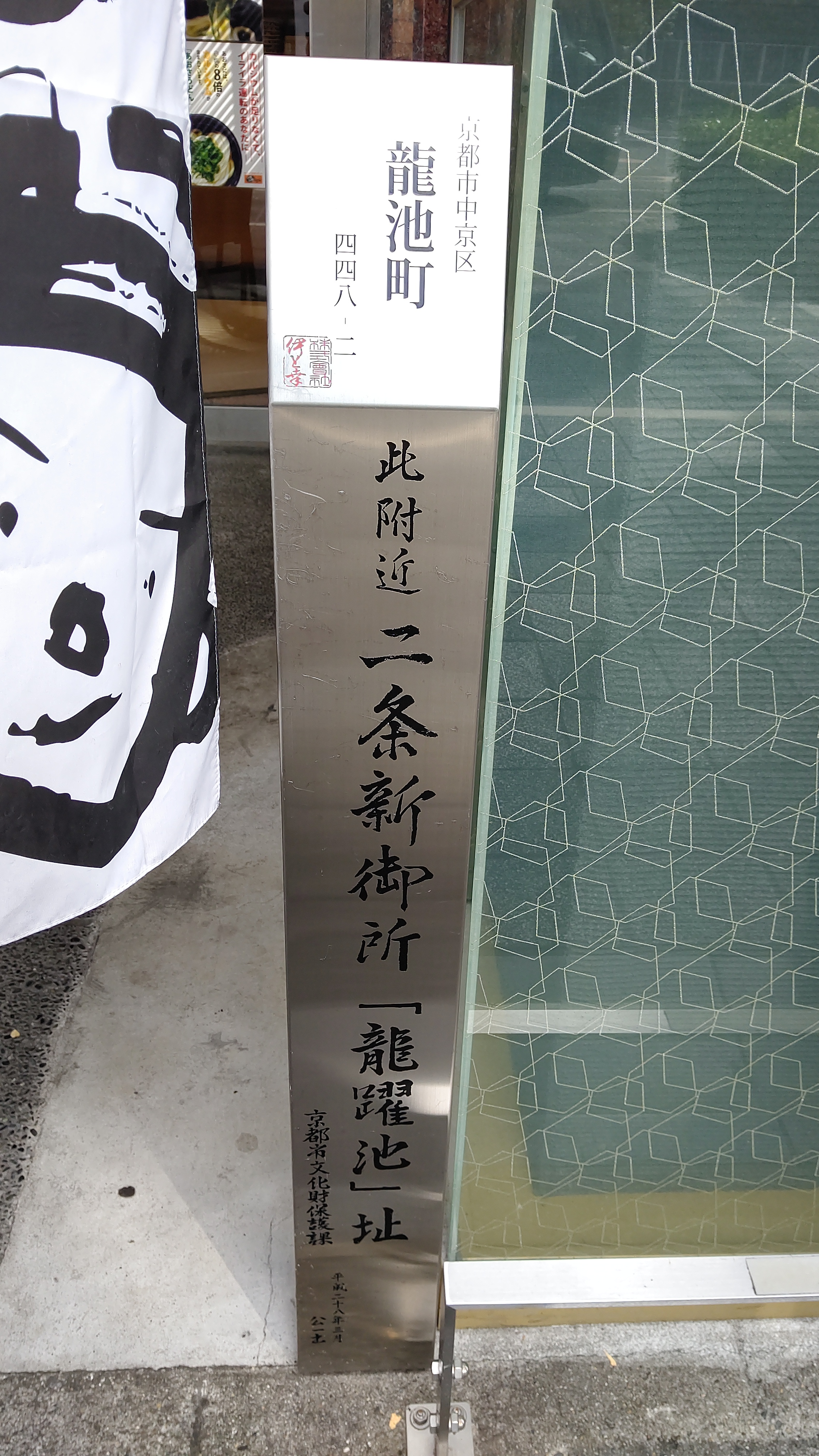 二条良基の邸宅跡